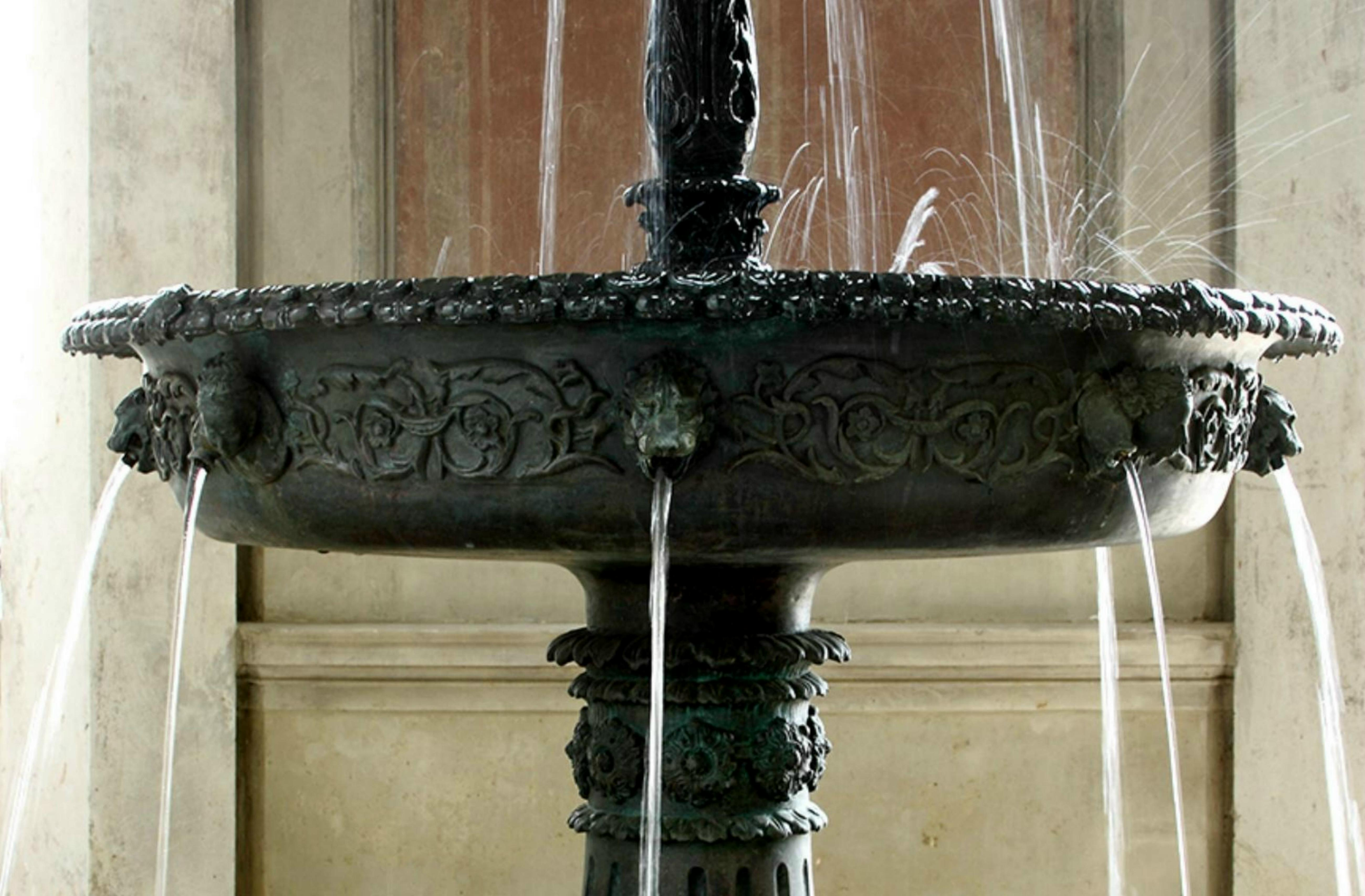 Brunnen im Lingnerschloss (Eva Backofen)